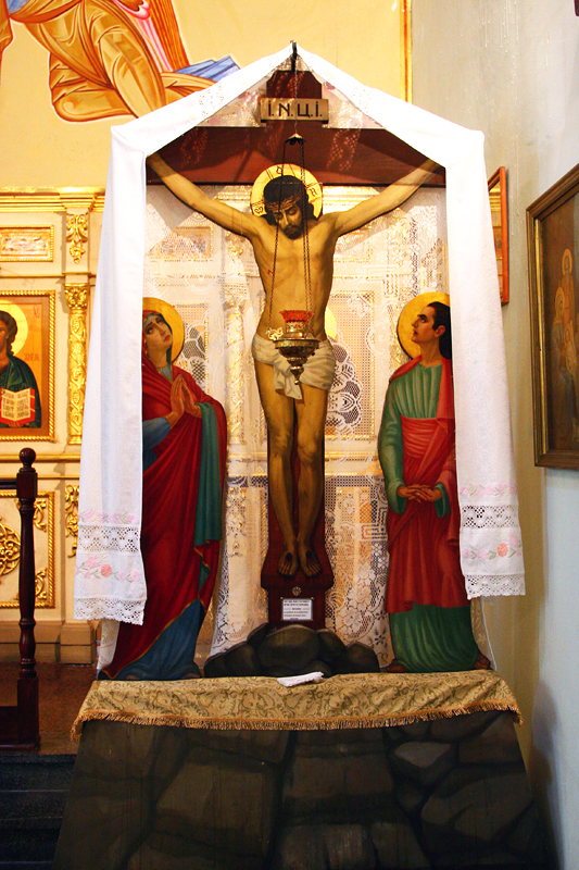 Голгофа с частицей Животворящего Древа Креста Господня.